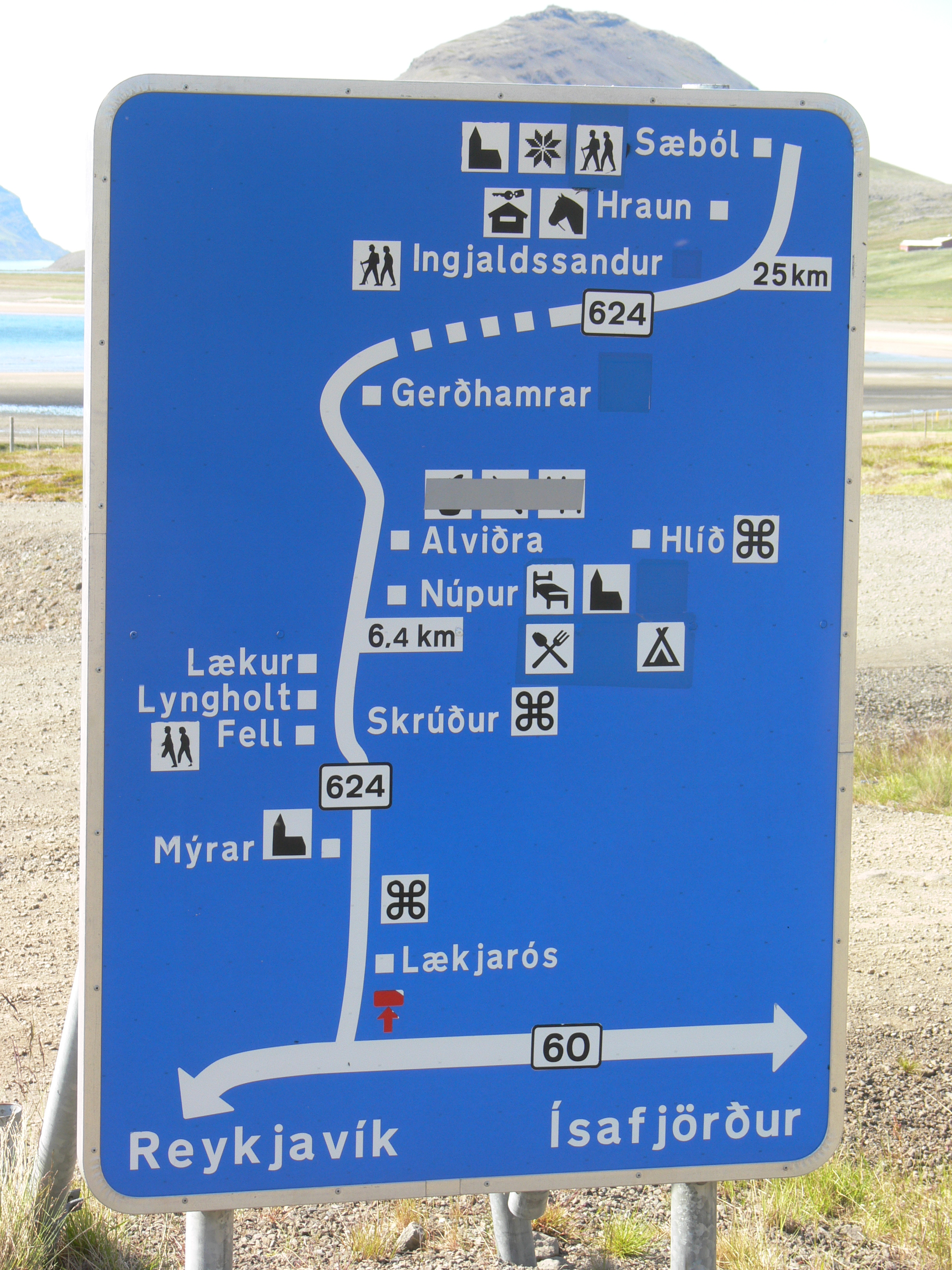 Hinweistafel für die Straße 624.